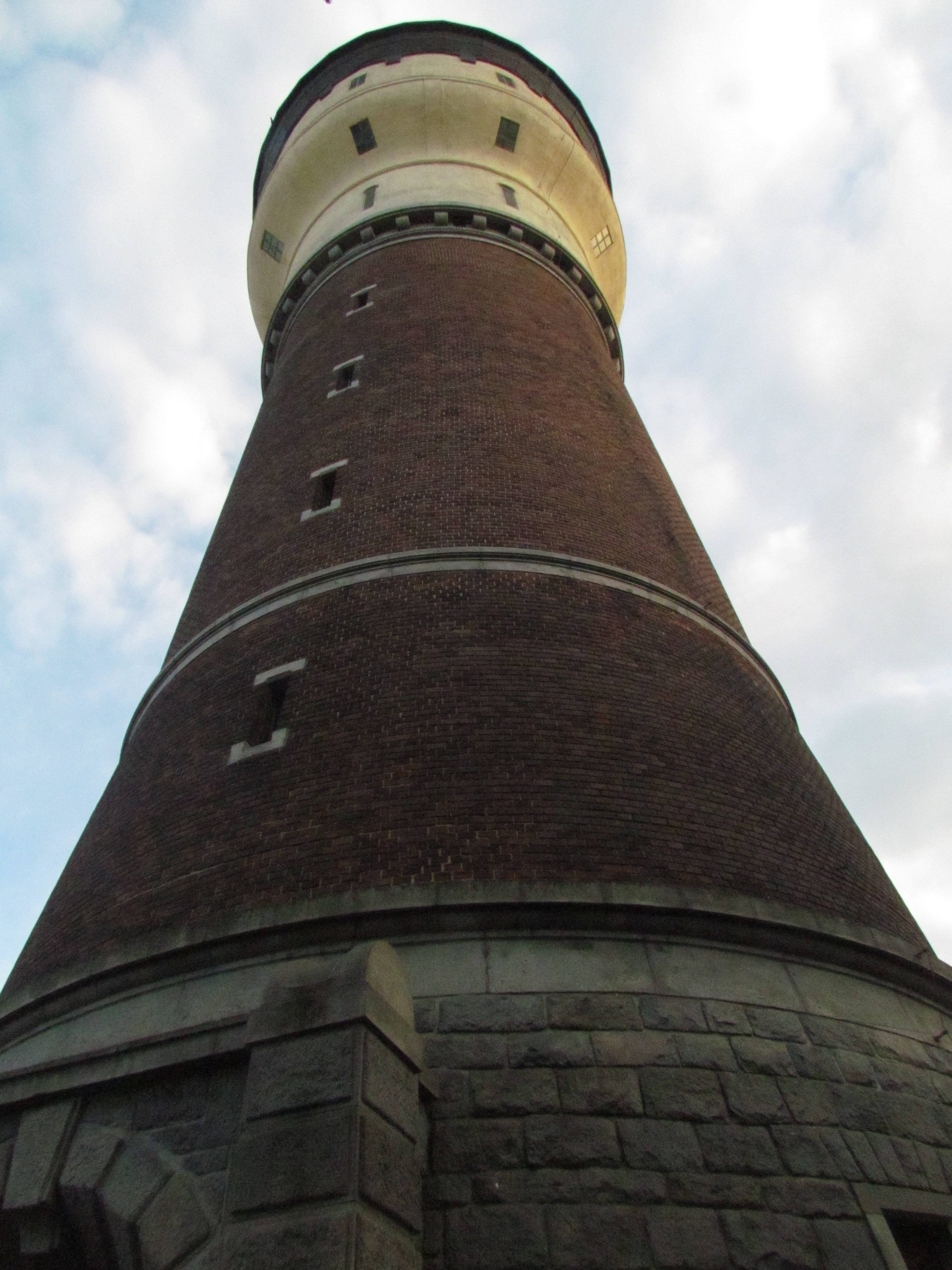 Pivovarská věž v areálu Plzeňského Prazdroje.